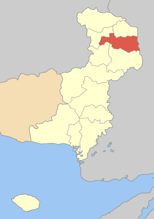 Дем Орестиада на картата на Ном Еврос, Гърция. Locator map of Orestiada municipality (Δήμος Ορεστιάδος) in Evros prefecture (Νομός Έβρου) in Greece.